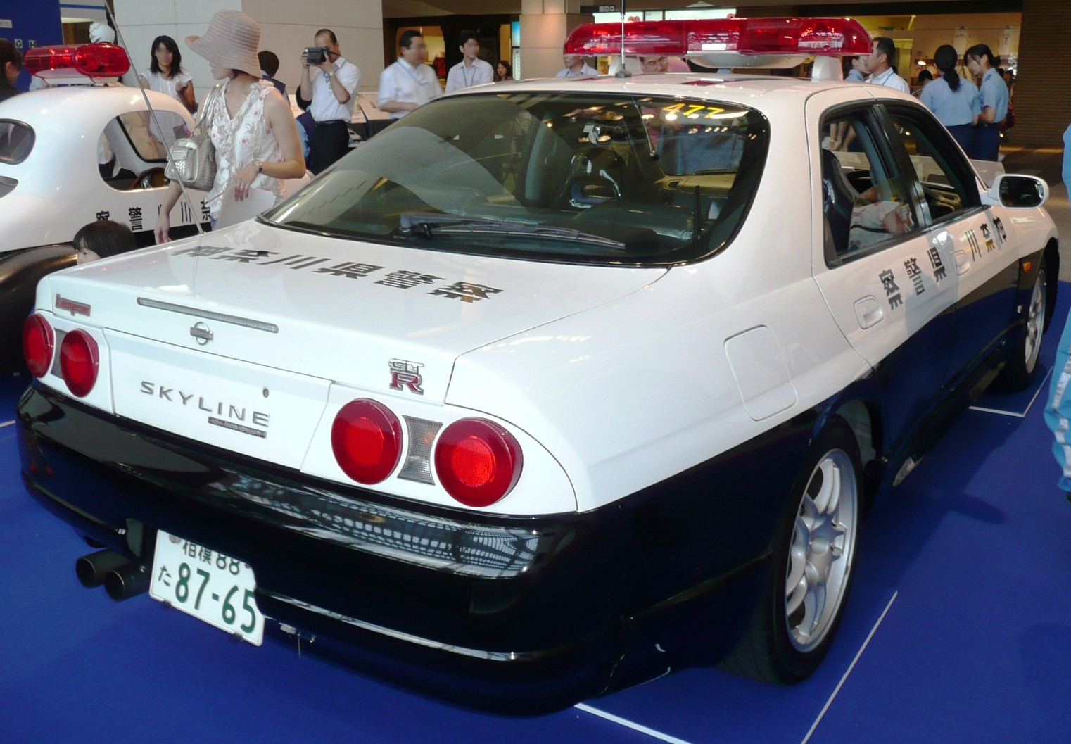 Nissan Skyline GT-R 4door model.